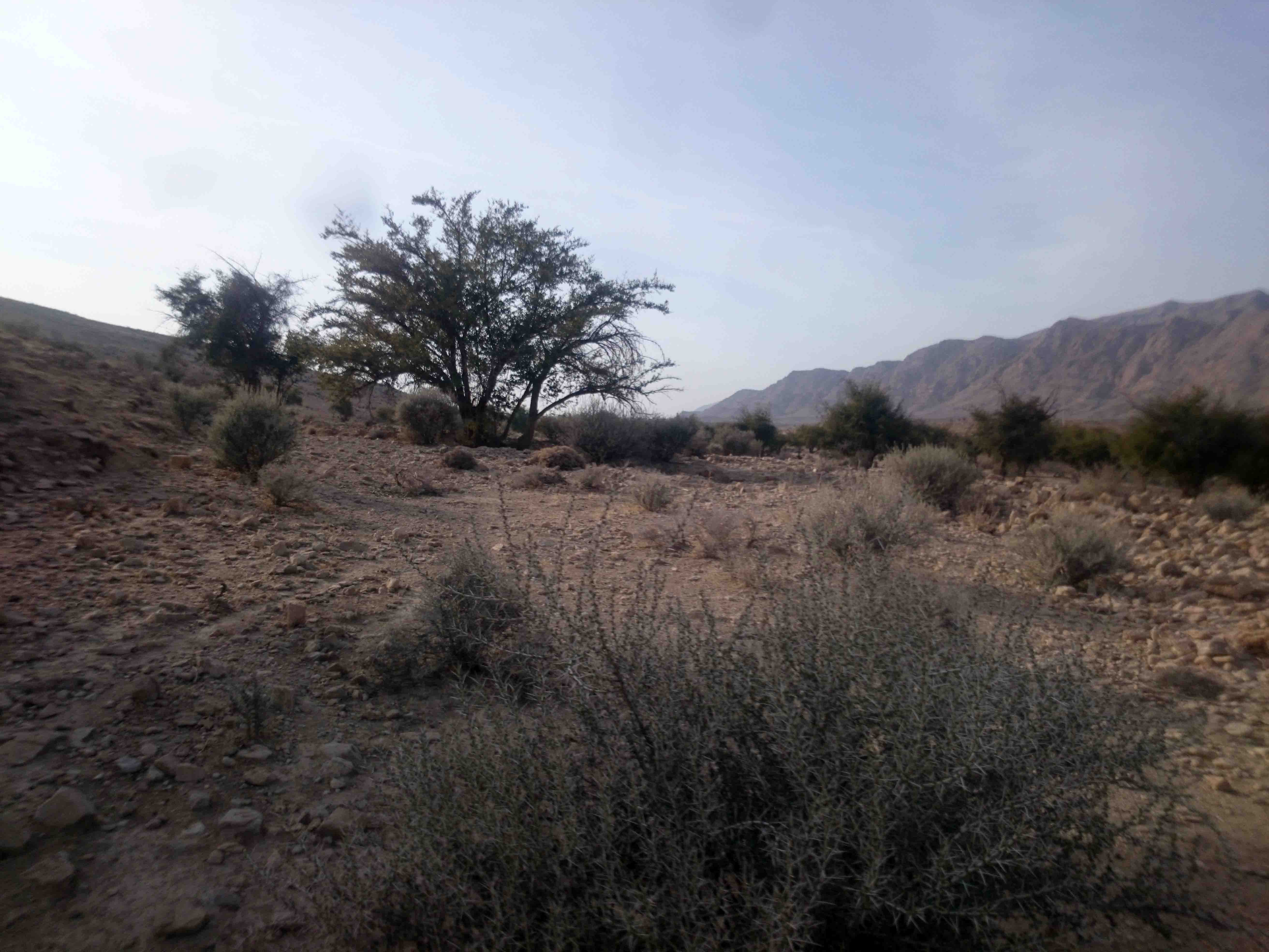 منطقه تفریحی- جنگلی شاه غریب